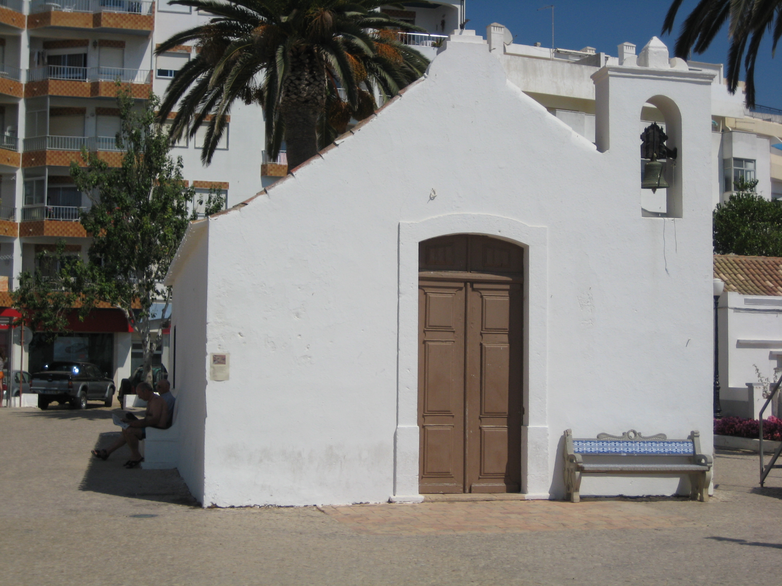 Capela de Santo António de Armação de Pêra